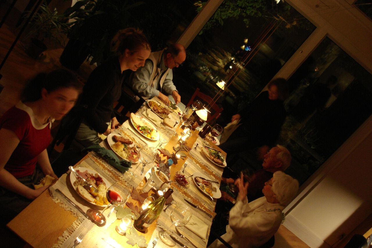 Thanksgiving dinner in Canada.